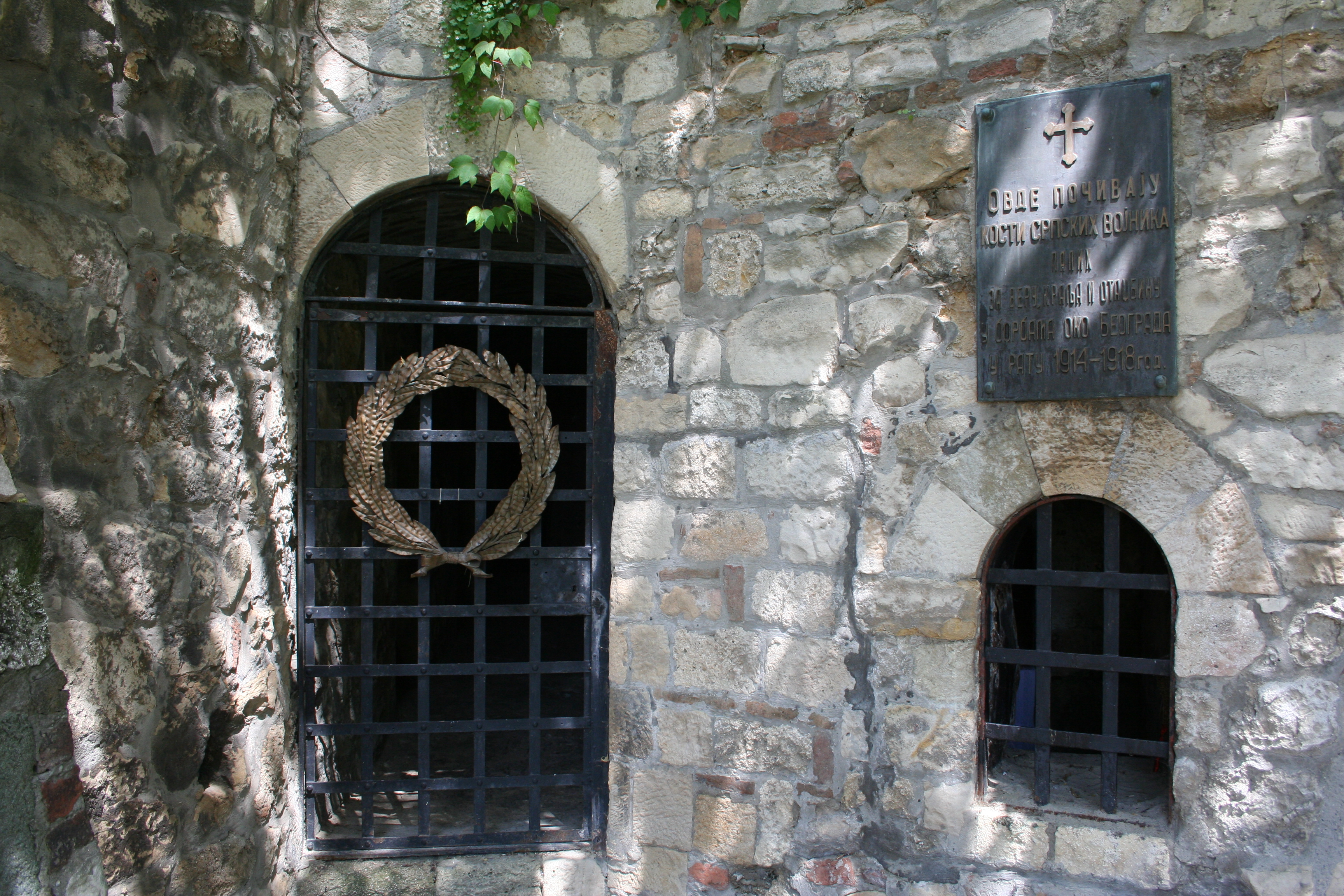 Crkva Sv. Petke u Beogradu